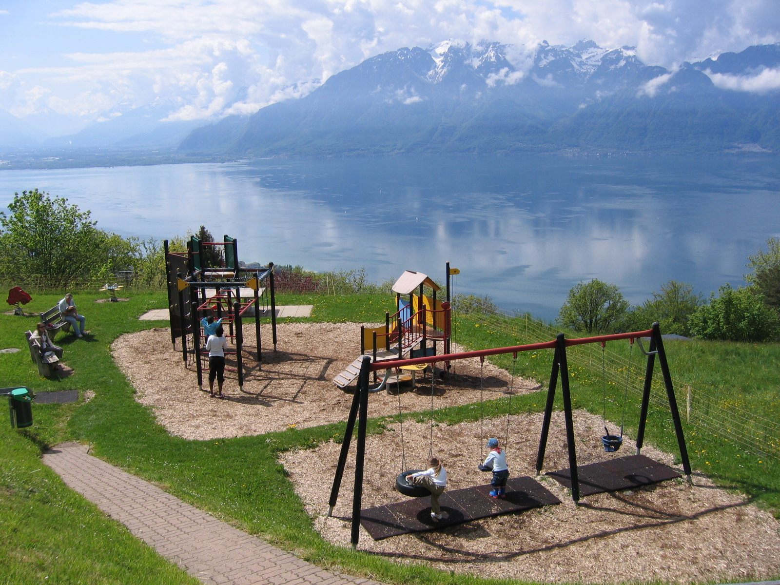 A playground in mountains. Une aire de jeux dans les montagnes.